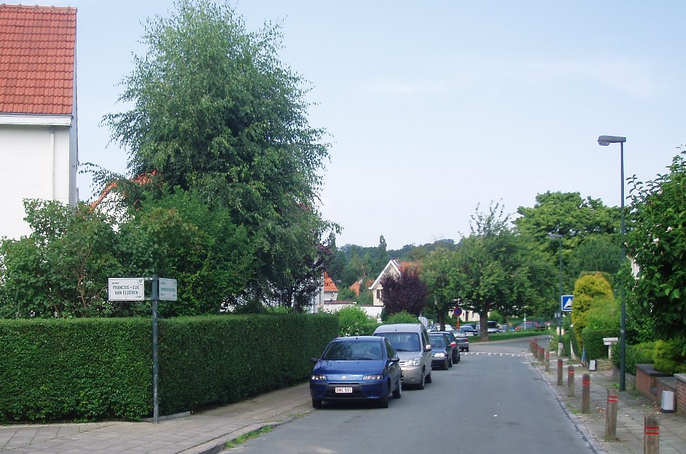 avenue François Elie Van Elderen Auderghem Belgium